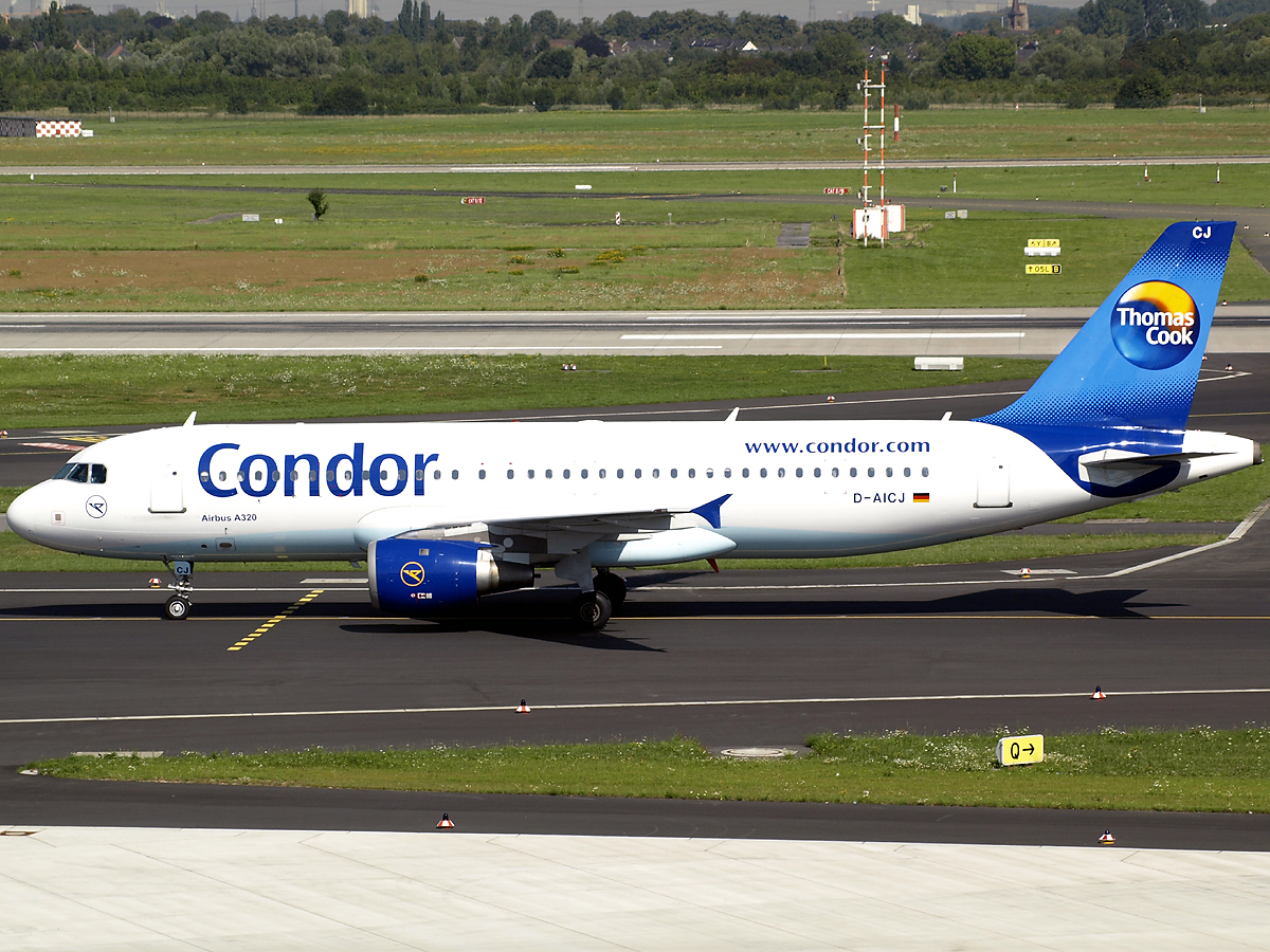 Airbus A320 der Condor im modifizierten Design